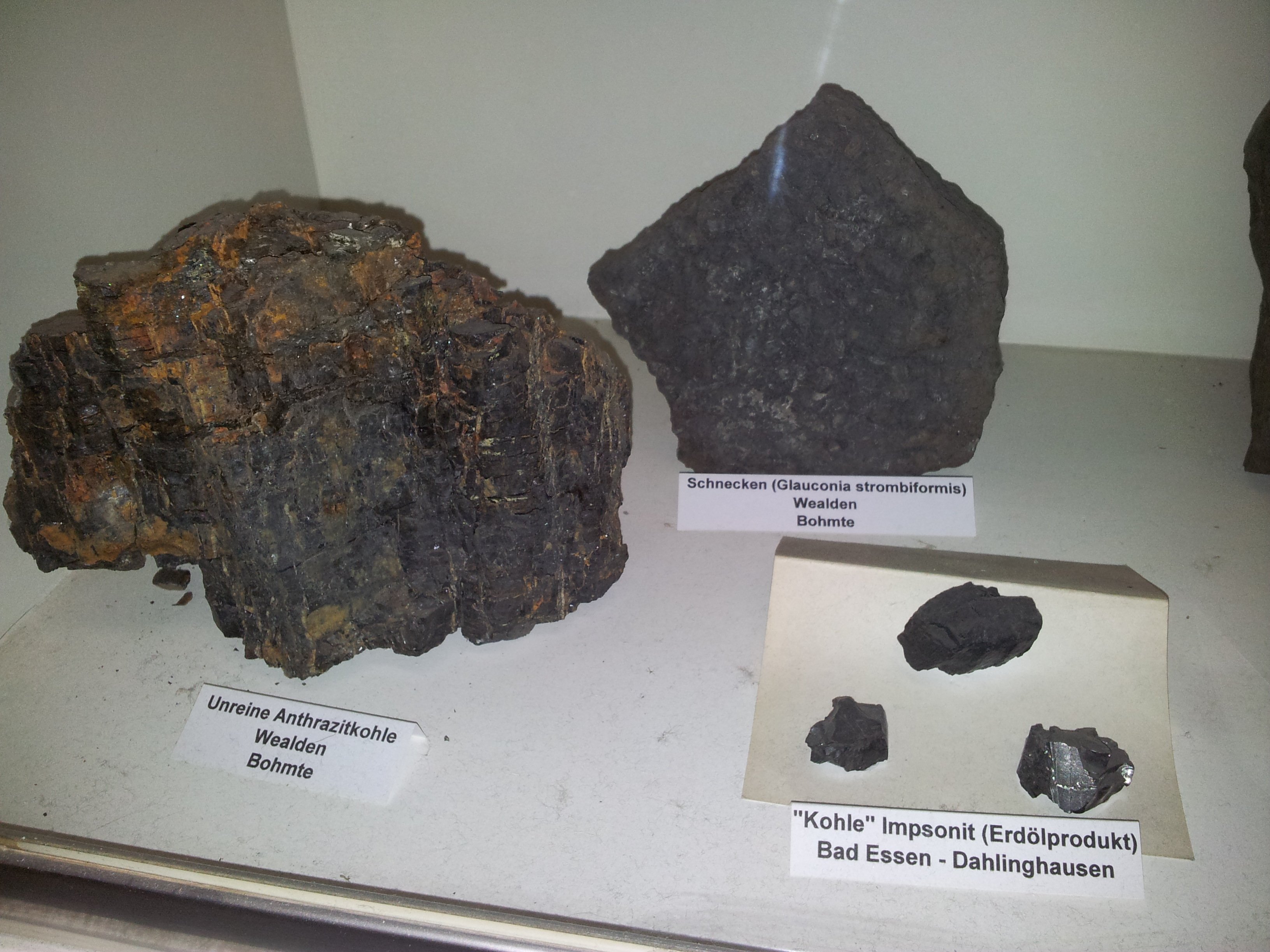 Kohlenstücke aus verschiedenen Förderorten.